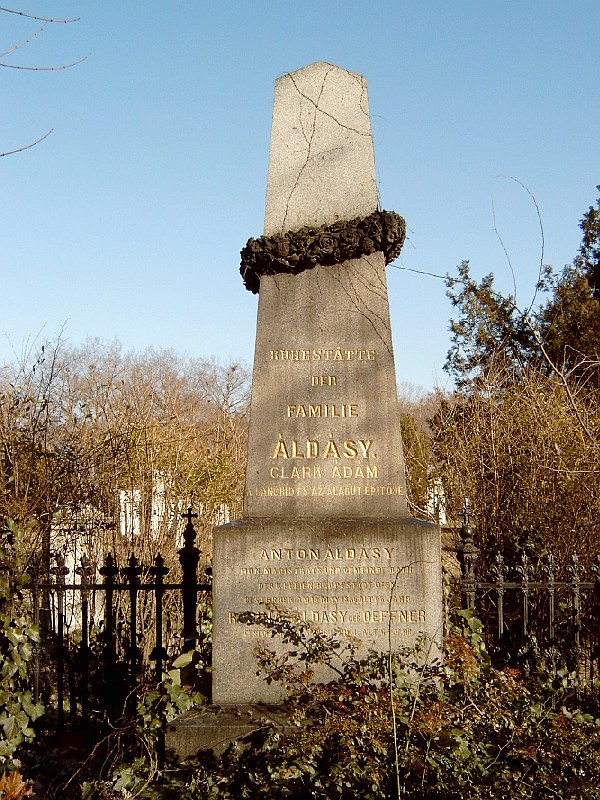 Clark Ádám sírja Budapesten. Kerepesi temető: 35-1-80.